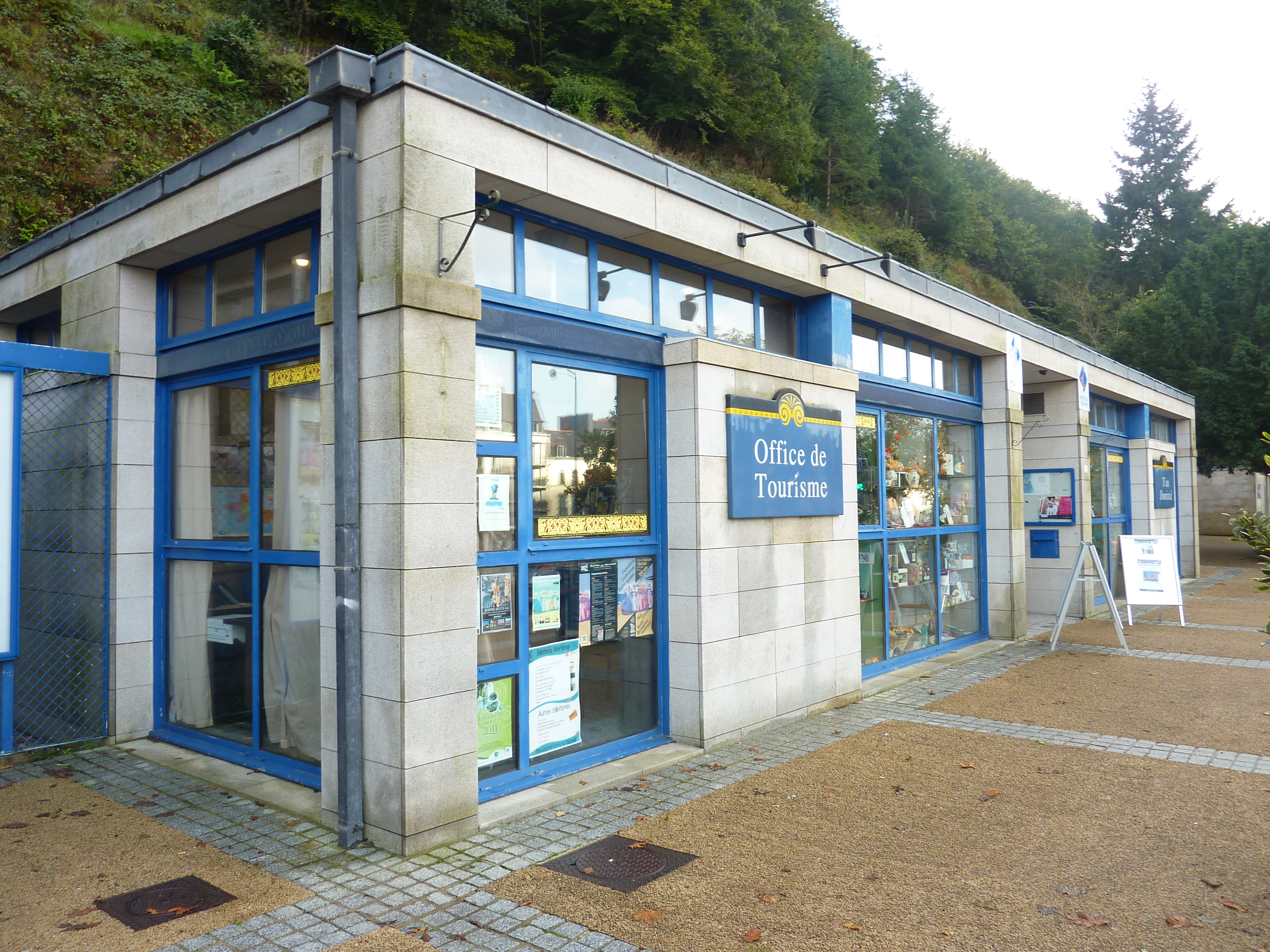 Quimper : l'Office du tourisme